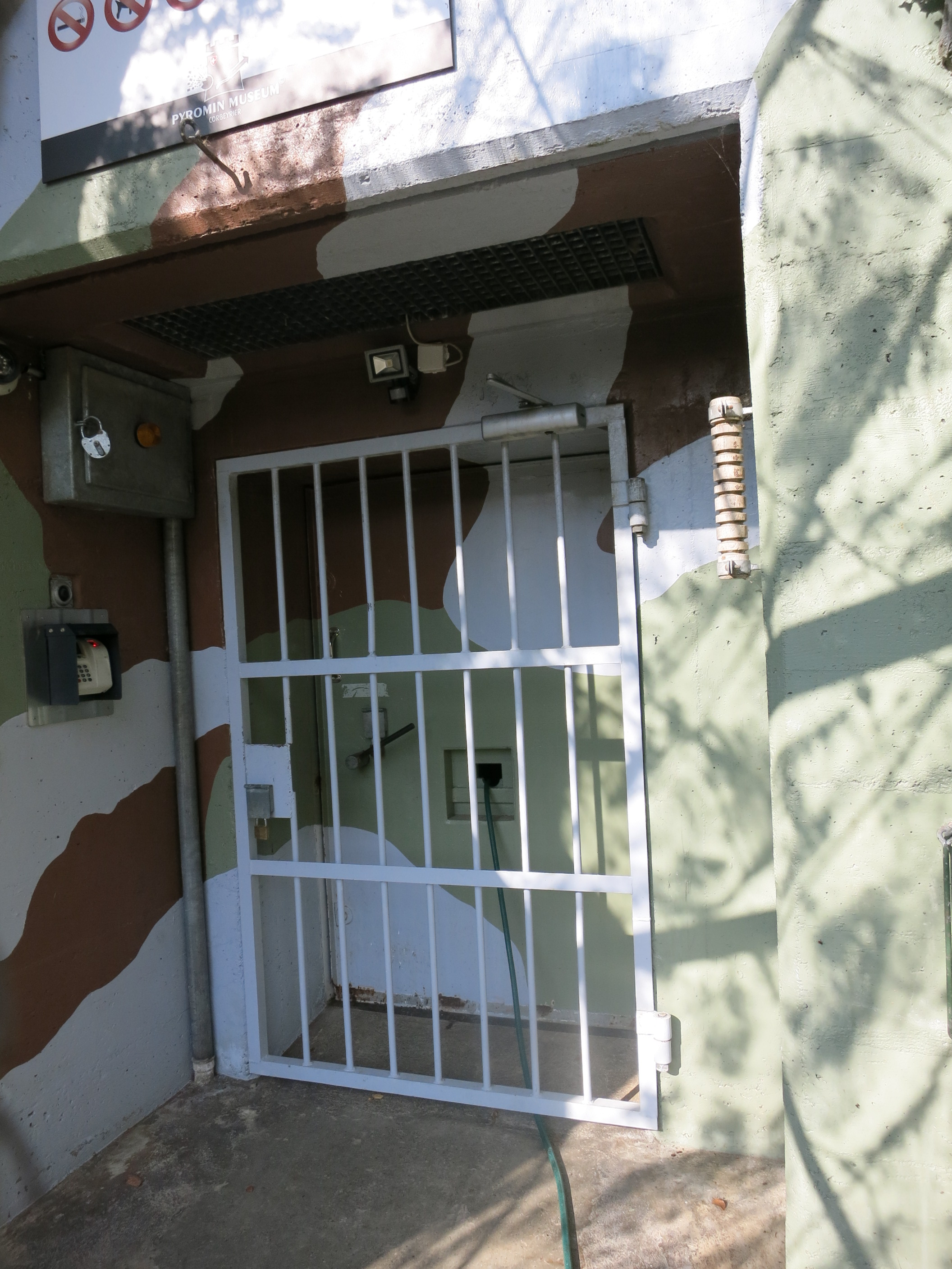 Artilleriewerk Champillon, Corbeyrier VD, Schweiz